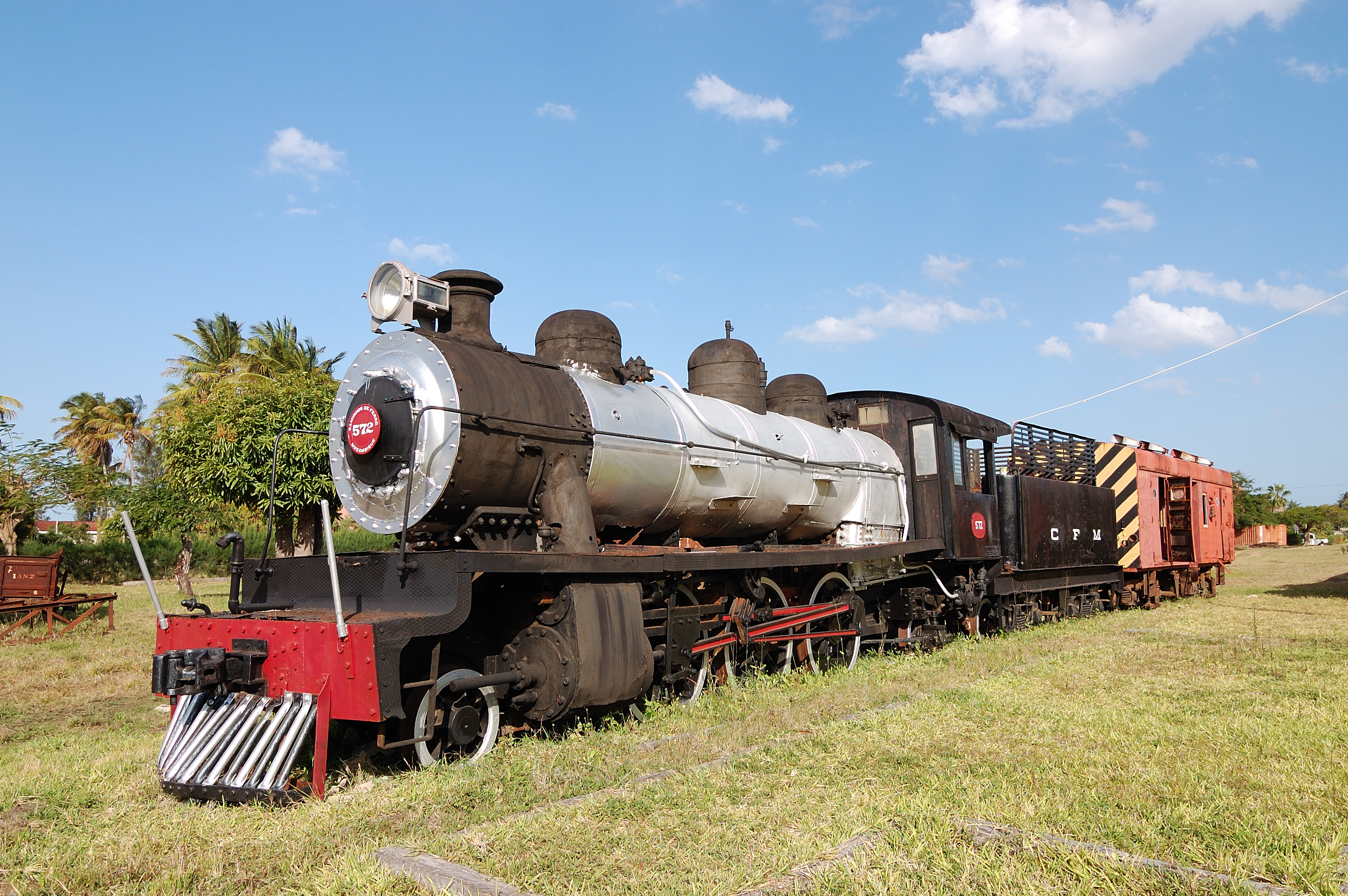 Steam locomotive at Inhambane, Moçambique [2009]